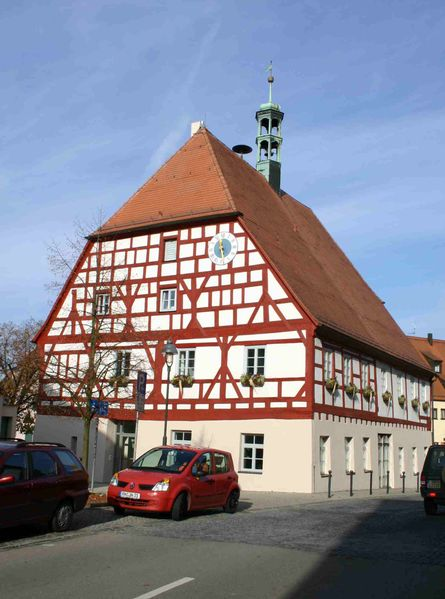 Rathaus Hilpoltstein